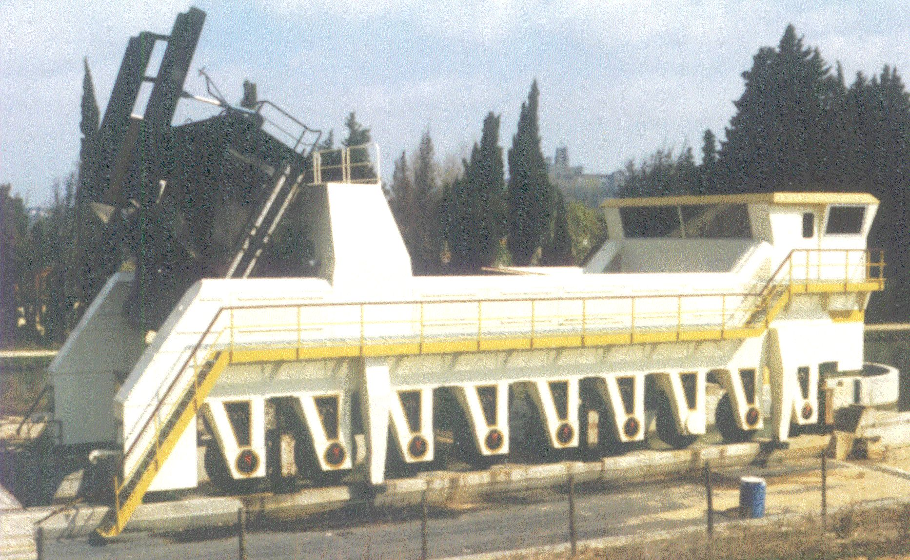 Canal du Midi: Wasserkeilhebewerk Fonserannes: der Traktor